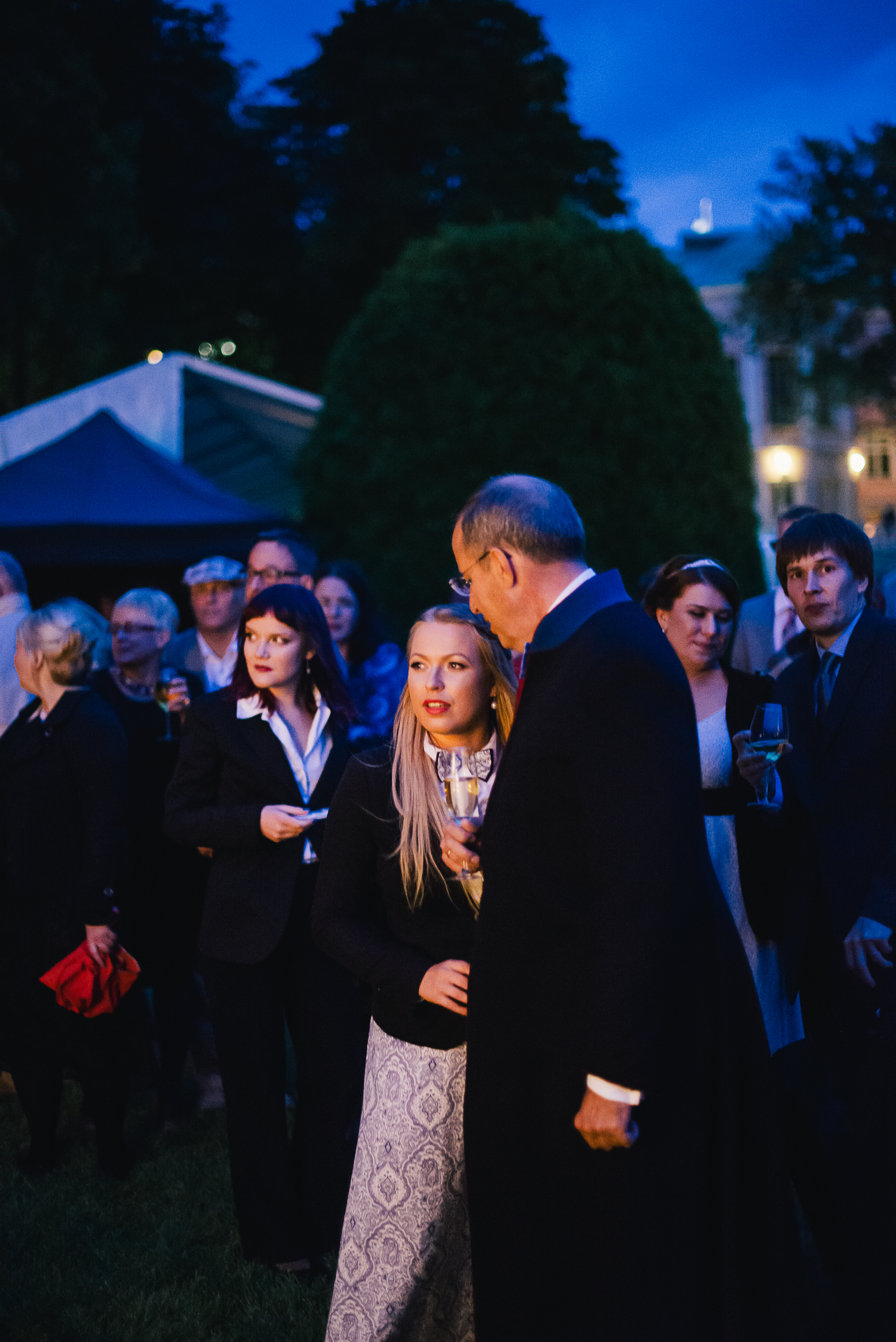 Eesti riikliku iseseisvuse taastamise aastapäeva vastuvõtt 2014. aastal. Keiti Vilms ja Toomas Hendrik Ilves.